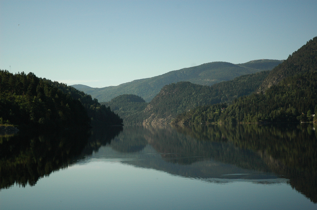 Kviteseidvatnet